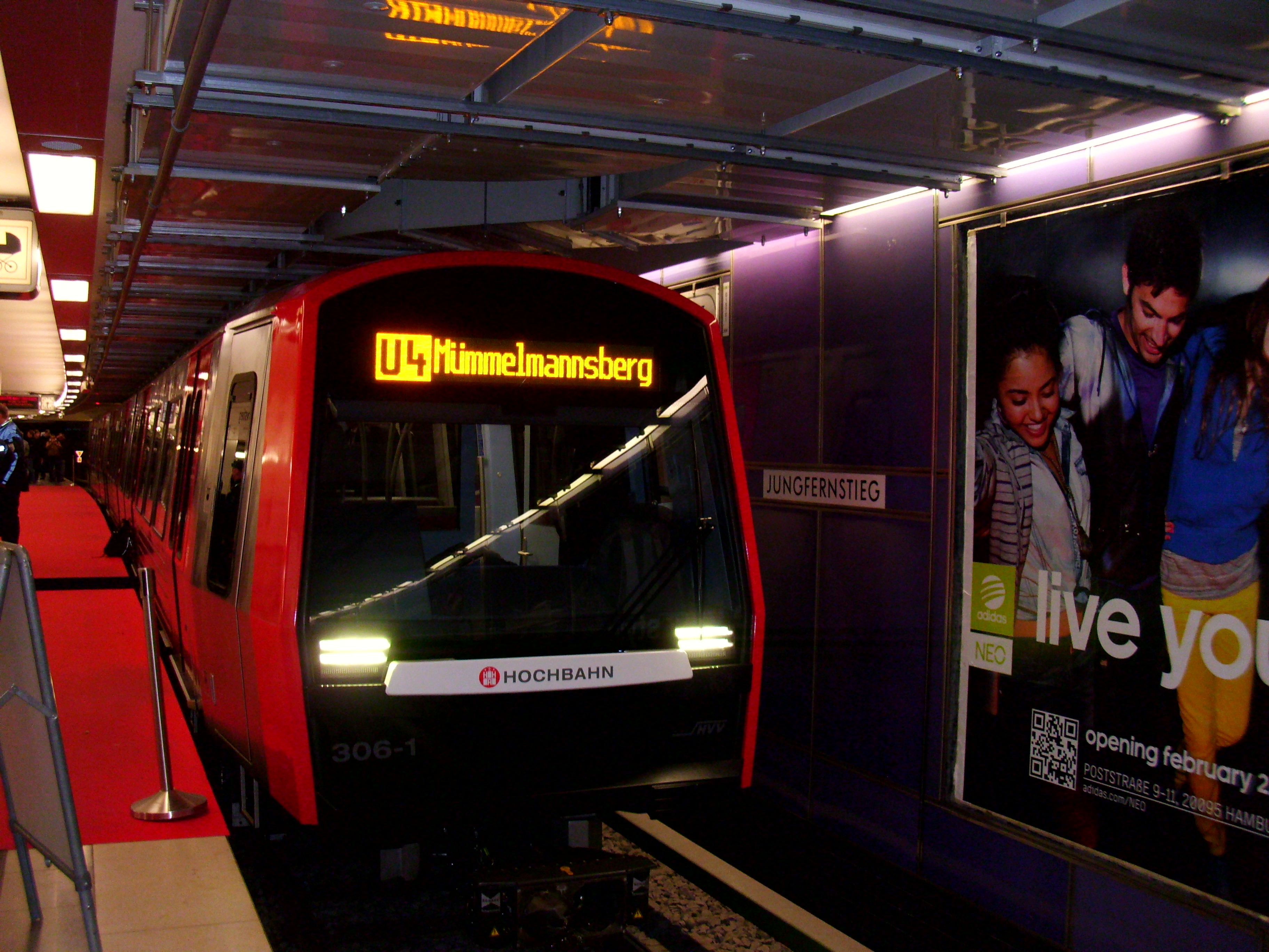 Der DT5 am 28.01.2012 bei der Öffentlichen Vorstellung in der Haltestelle Jungfernstieg, Gleis der U4 Richtung Billstedt. Front des Wagens 306-1 Der Zugzielanzeiger zeigt "U4 Mümmelmannsberg" an, obwohl die U4 nur bis Billstedt fahren soll.